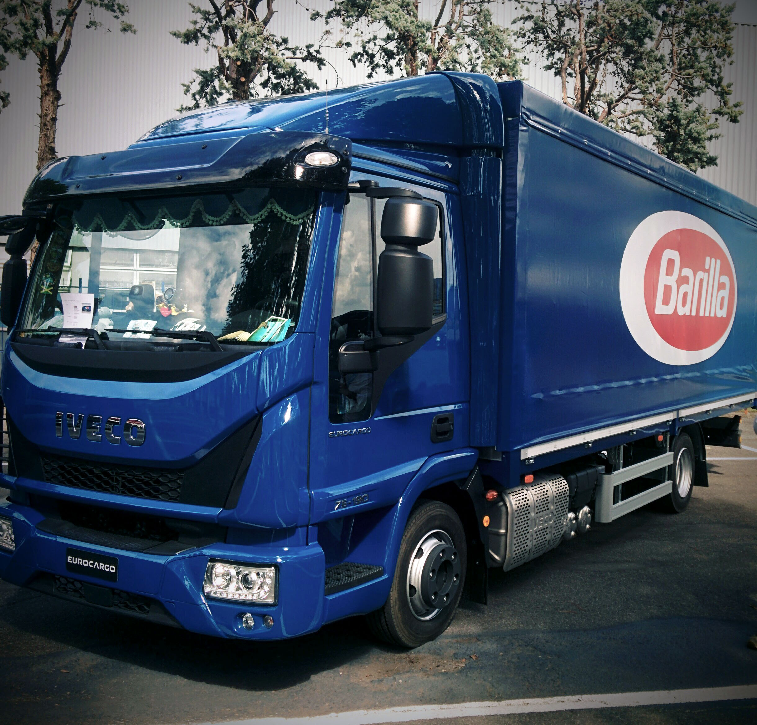 Iveco Eurocargo MY2015